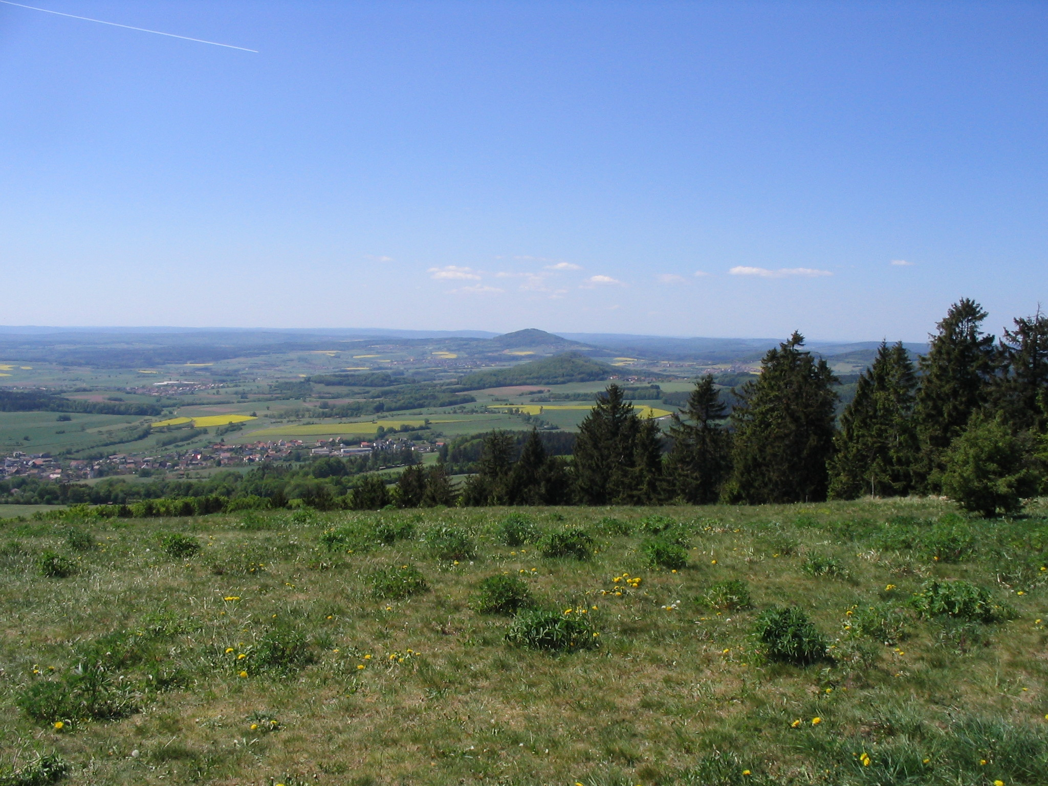 Blick von der Platzer Kuppe (737 m) nach Westen zum Dreistelzberg (660 m)